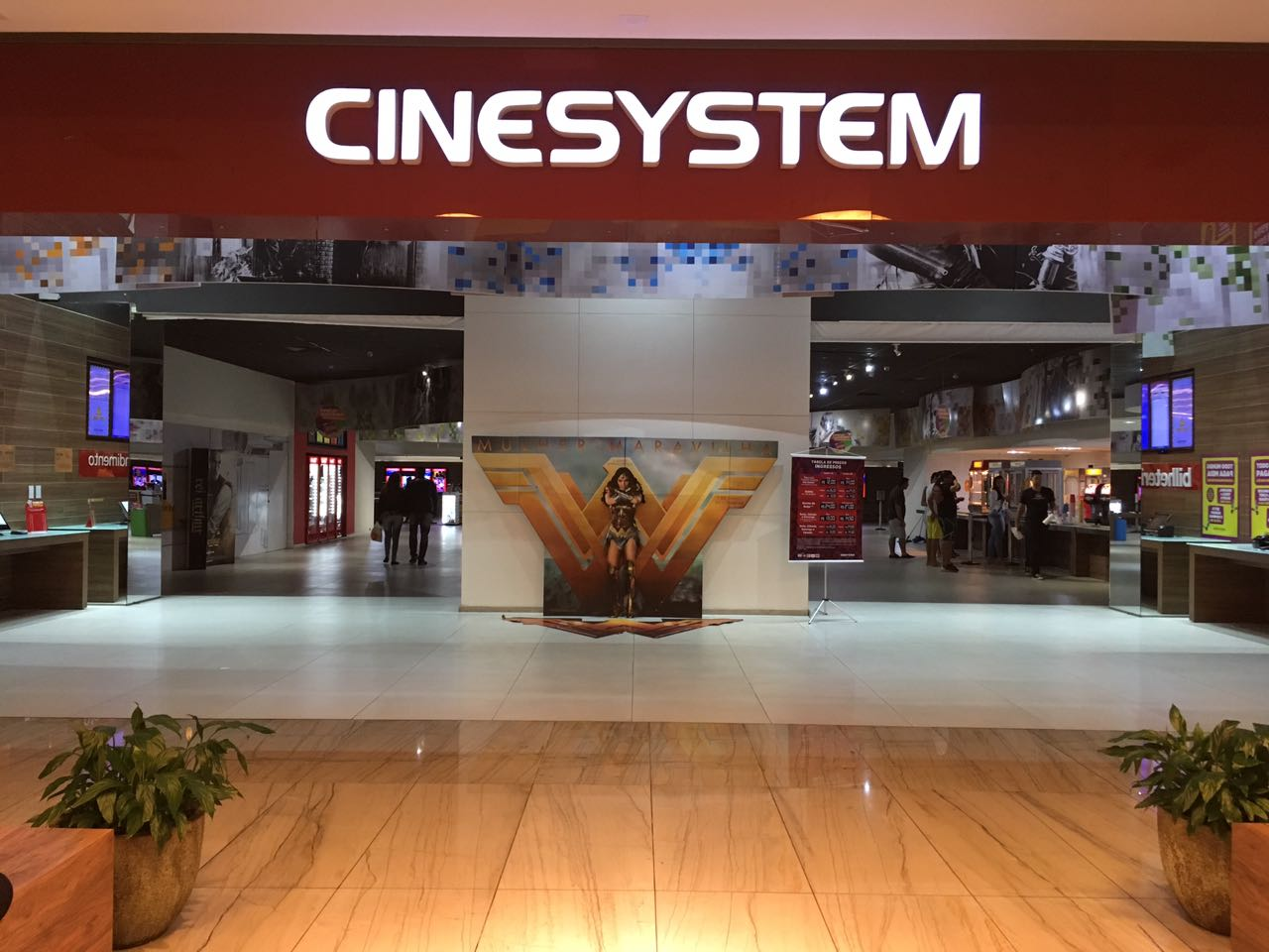 Entrada do Cinesystem do Shopping Boulevard Shopping Vila Velha